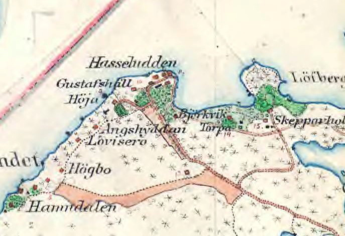 Hasseludden på Häradsekonomiska kartan